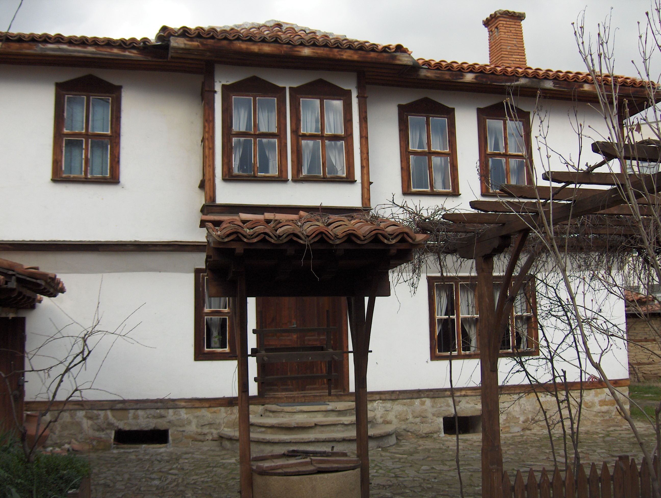 Музей по лозарство и винарство Сунгурларе